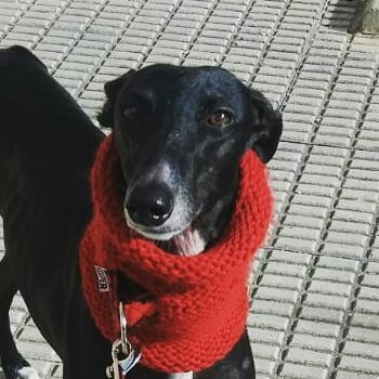 Galgo negro con bufanda